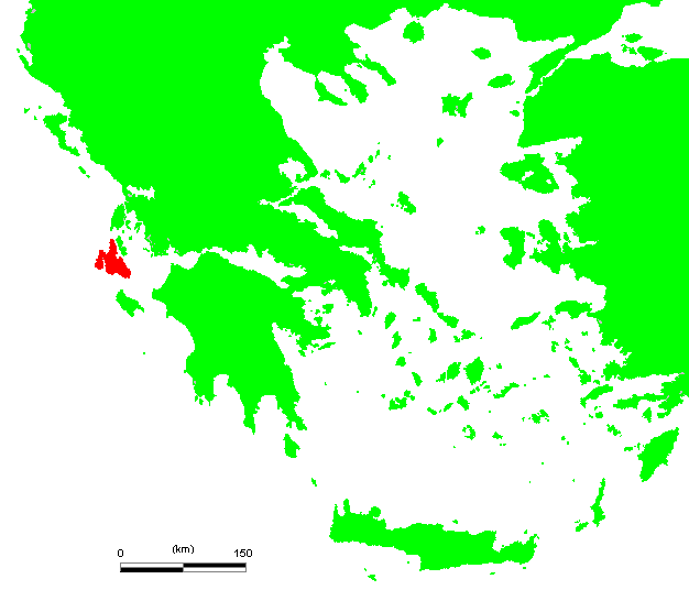 GR Kefalonia.PNG (Greek island)